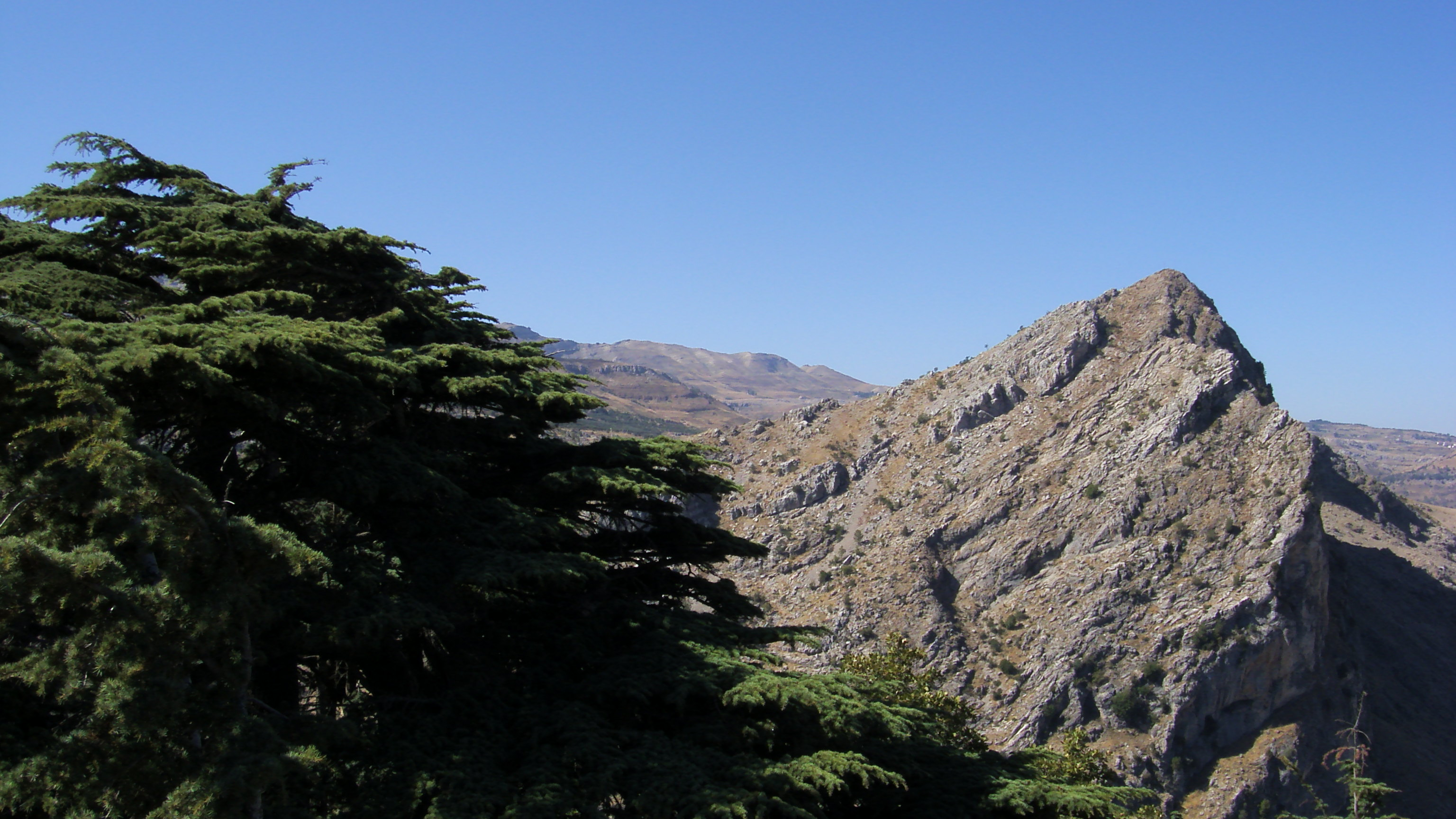 Cèdre et montagne près de Tannourine